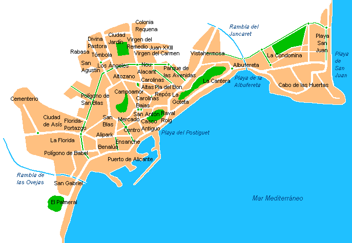 Barrios y zonas de Alicante